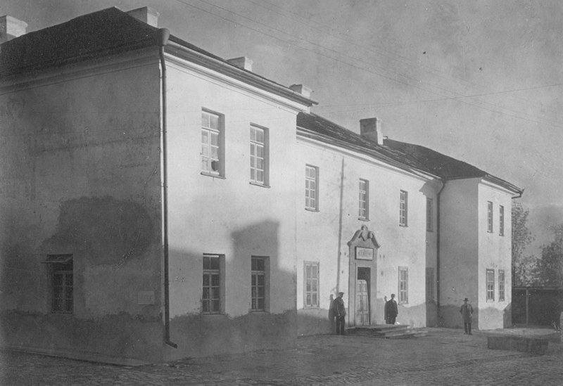 Беларуская (тарашкевіца): Наваградак (Navahradak), завулак Дамініканскі (zavułak Daminikanski). Кляштар дамініканак